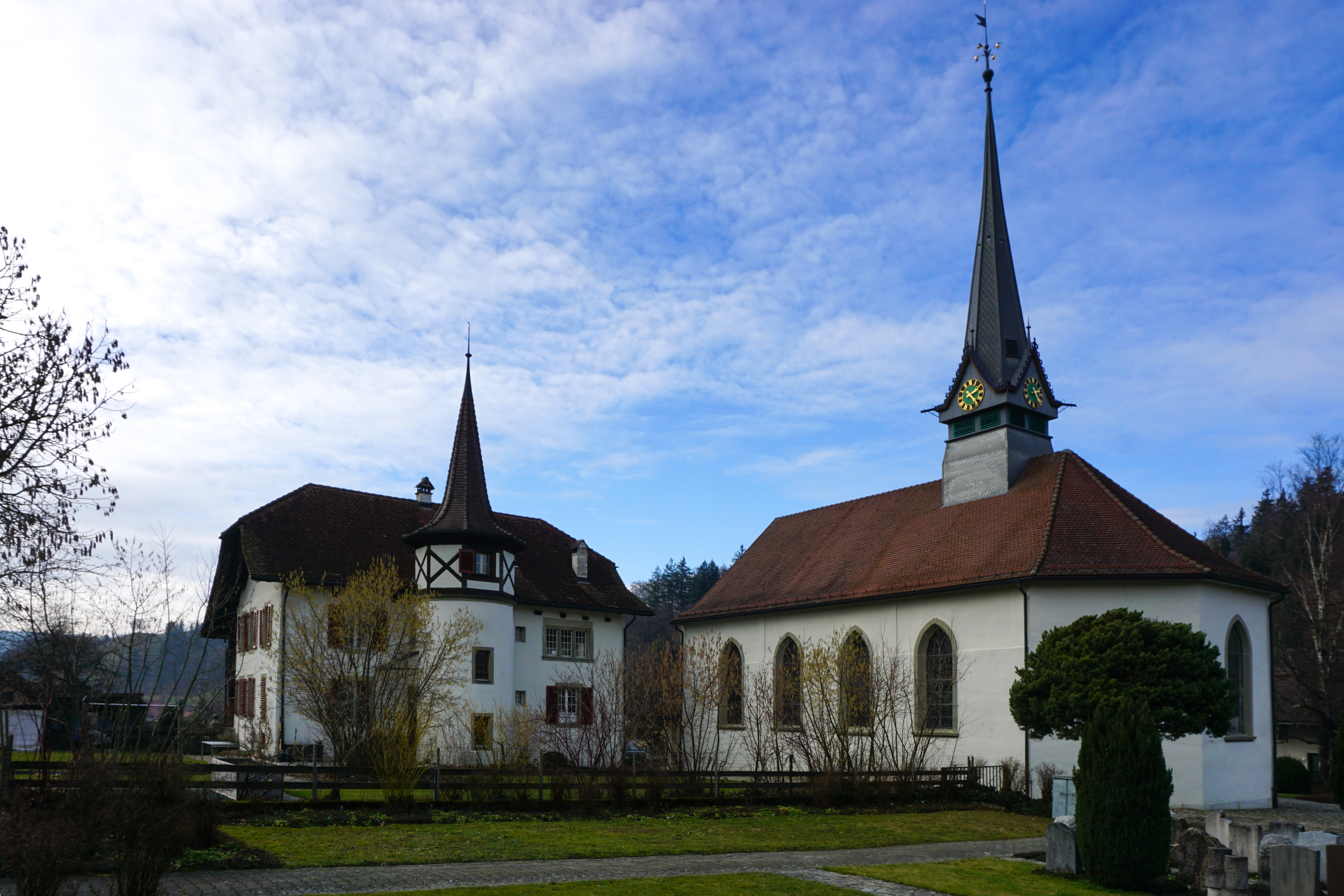 Kirche und Pfarrhaus von Süd-Osten